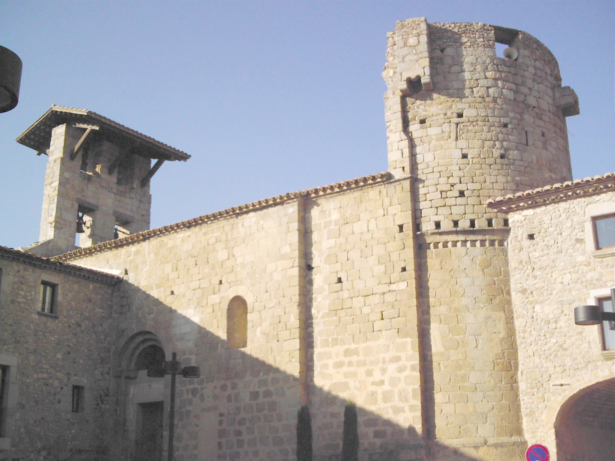 église sta Agata de Capmany (Alt Empordà)